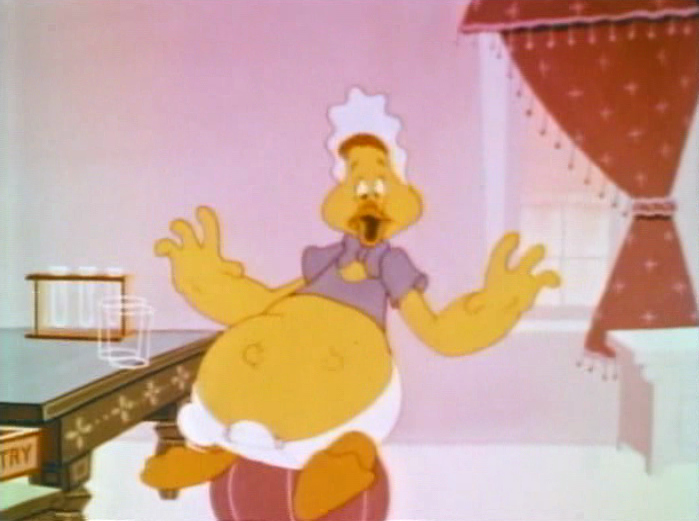 Baby Huey en una escena de 'Pest Pupil' (1956). La caricatura está en dominio público.